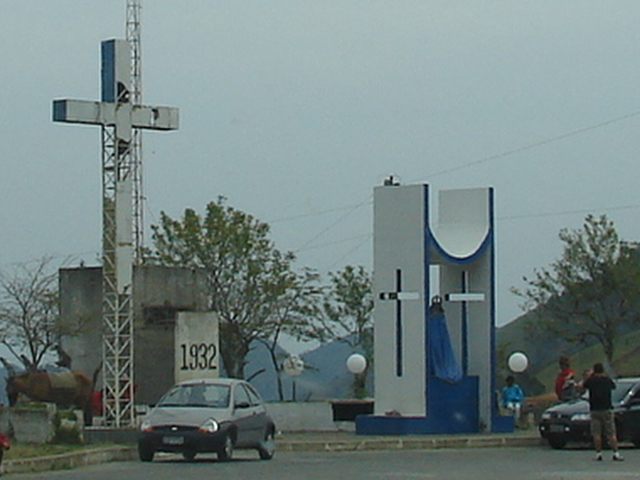 Altar a Nossa Senhora Aparecida no Embaú Autor: A. G. Freitas Neto Data: 10/09/2006 Fonte: Arquivo Particular OBS: Foto tirada com equipamento digital Sony H2 resolução 640x480 (alterada)